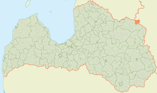 Pededzes pagasts